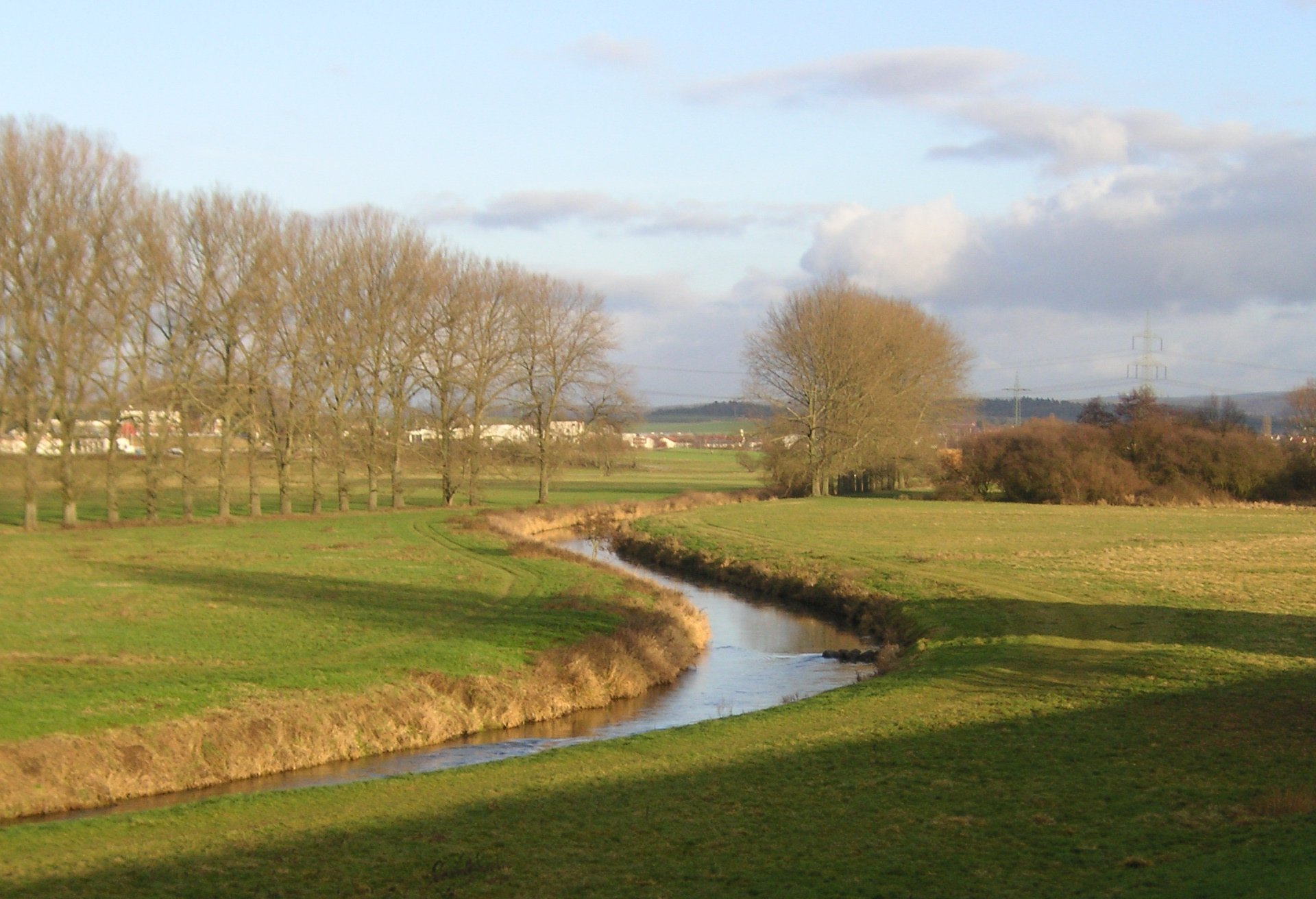 Die Schwalm im Hochwasserrückhaltebecken von Schwalmstadt. Autor / Quelle: Selbst fotografiert im Dezember 2005. Lizenz: Keine Rechte vorbehalten (Public Domain).